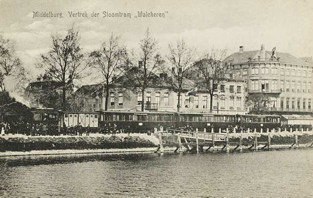 Middelburg, Vertrek der Stoomtram "Walcheren". Gezicht over het Kanaal door Walcheren op de Blauwedijk met vertrekkende stoomtram.